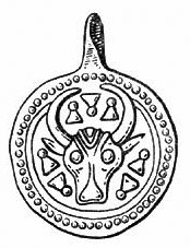 Підвіска, знайдена у кургані радимичів ХІ-ХІІ ст.